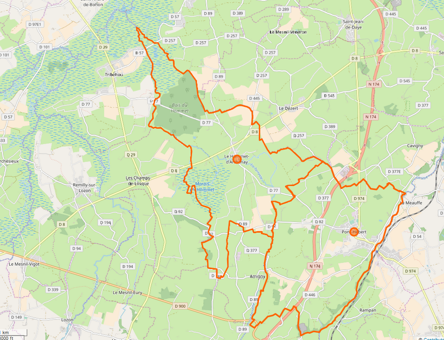 commune nouvelle de Pont-Hebert en 2018